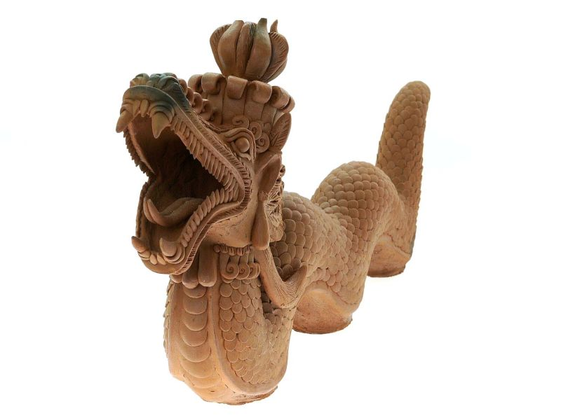 Beeld. Het sierobject (naga-slang) is gekocht van de maker in het dorp Kasongan, bij Yogyakarta, Midden-Java. Het dorp Kasongan staat bekend als een keramiekdorp waar vrijwel de hele bevolking leeft van het maken en de verkoop van aardewerk.. Beeld voorstellend de slang naga Unknown language: Naga